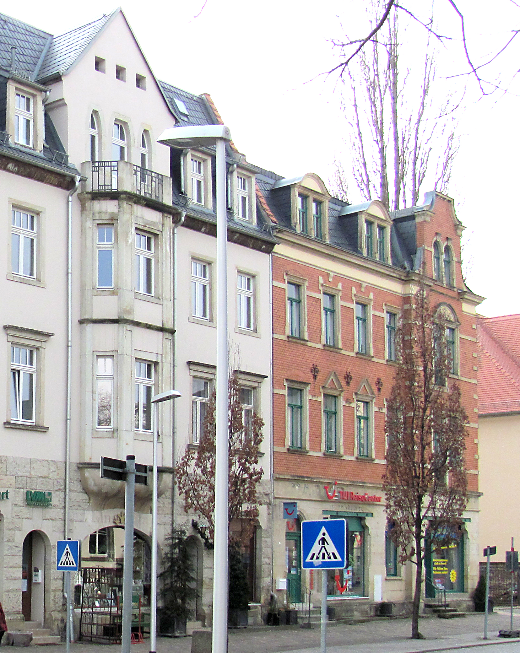 Rechts steht das Wohn- und Geschäftshaus Hauptstraße 8, links das ehemalige Radebeuler Postamt Radebeul, Wohn- und Geschäftshaus Oswald Funke